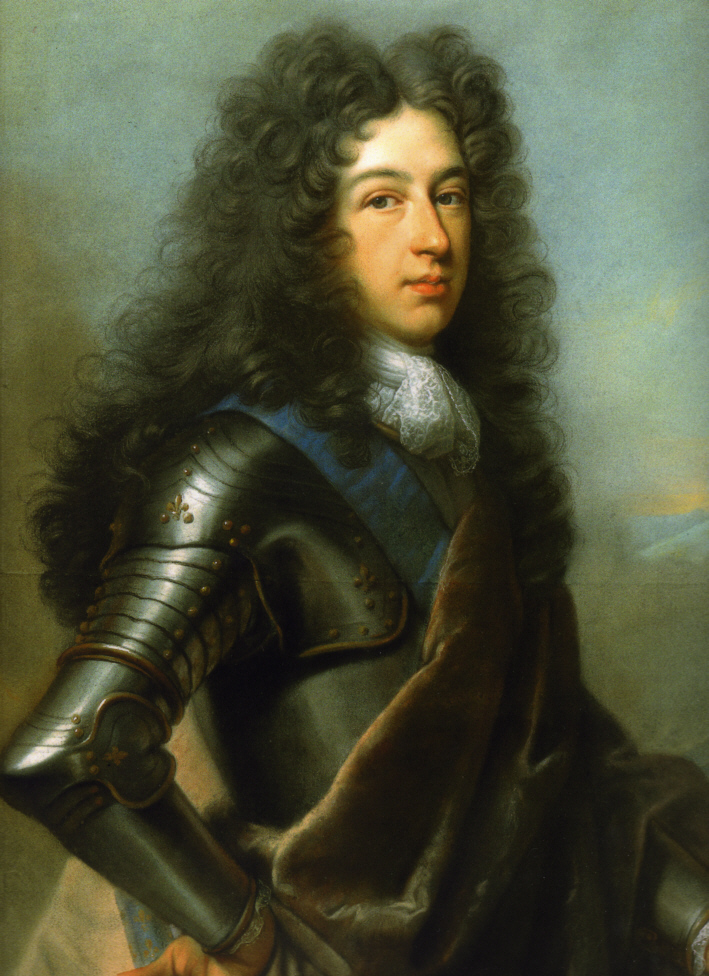 Portrait de Louis de France, duc de Bourgogne (1682-1712)